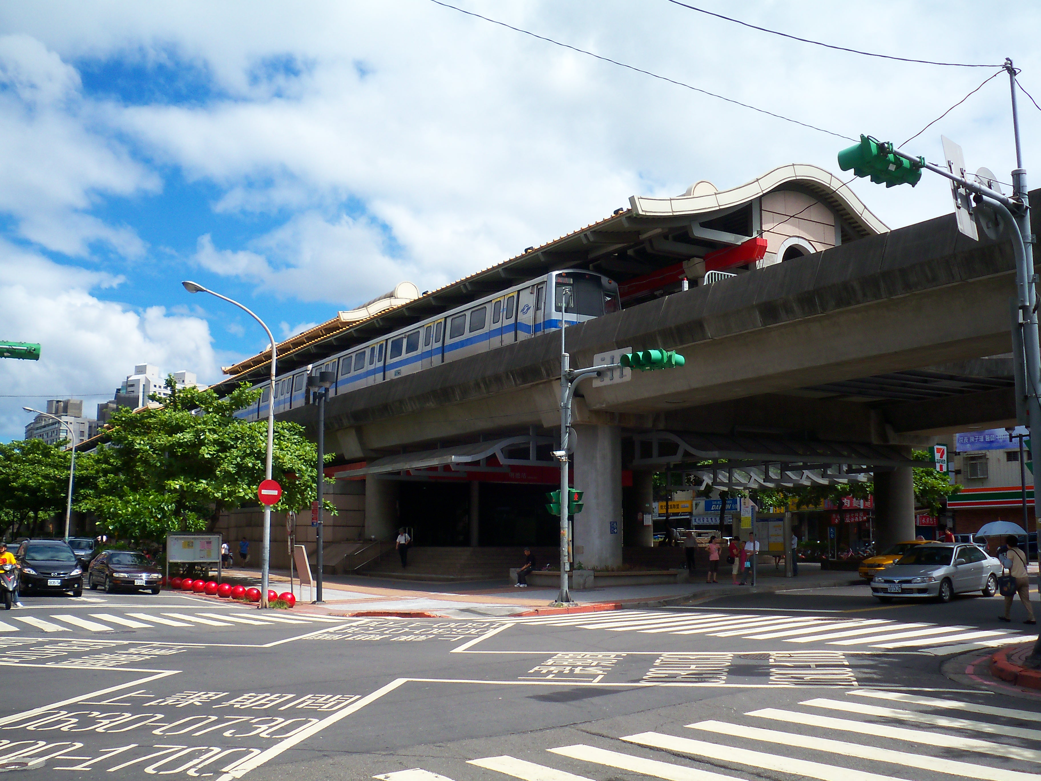 台北捷運淡水線明徳駅駅舎。